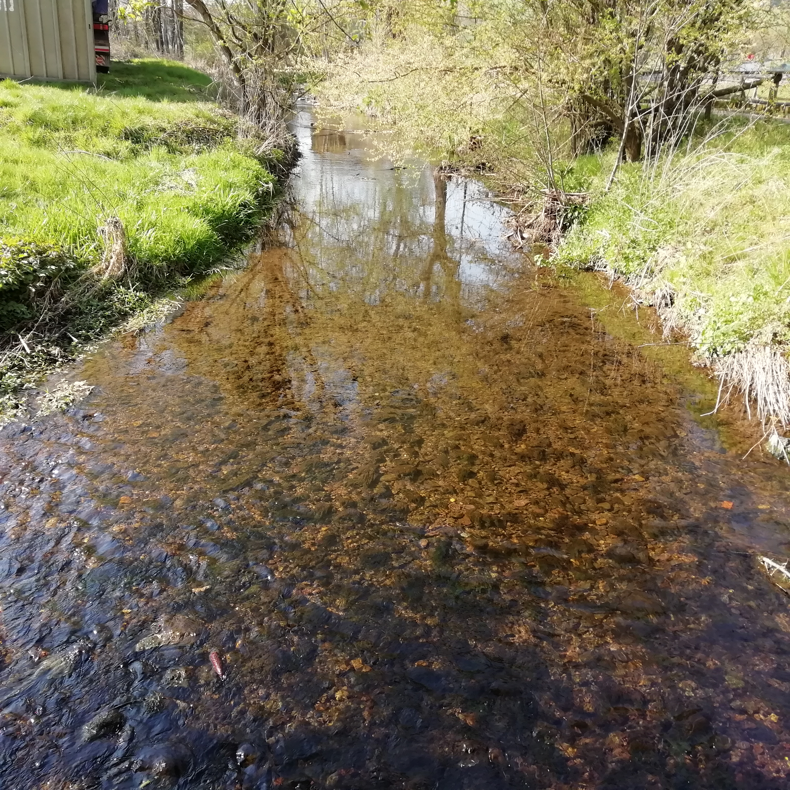 Die Uffe, hier als Sachsengraben bekannt, in Branderode, Gemeinde Hohenstein, Landkreis Nordhausen (Nordthüringen).